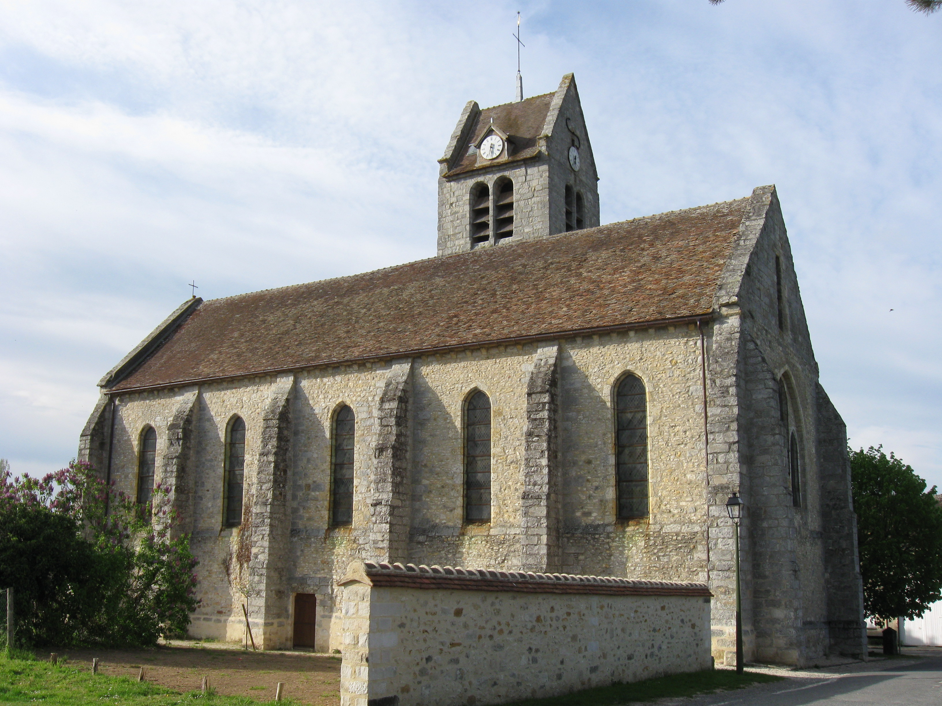 Église Saint-Étienne de Villiers-sous-Grez. (département de la Seine et Marne, région Île-de-France).